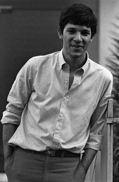 Fernando Haddad vence no Centro Acadêmico XI de Agosto. 25/10/1984 - Foto: Paulo Leite/Folhapress - Agência O Globo